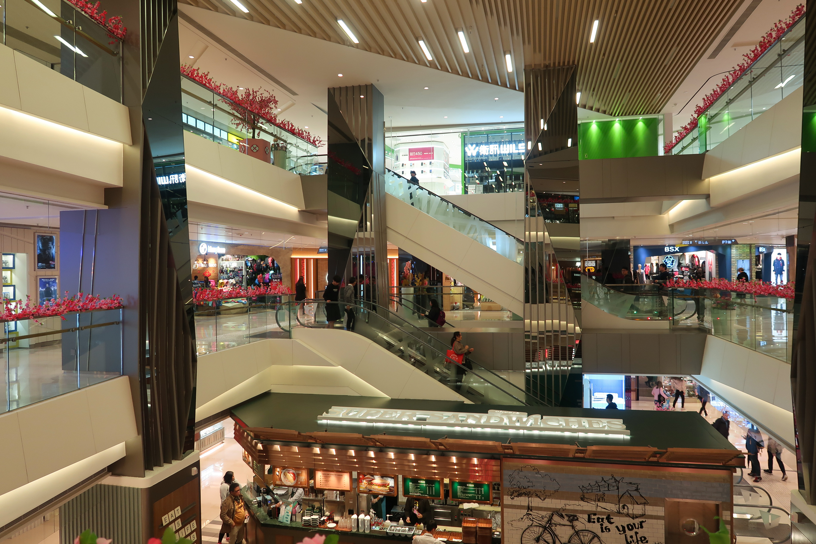 YOHO Mall II Void1